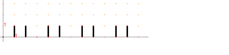 cree sous cabrigeometre